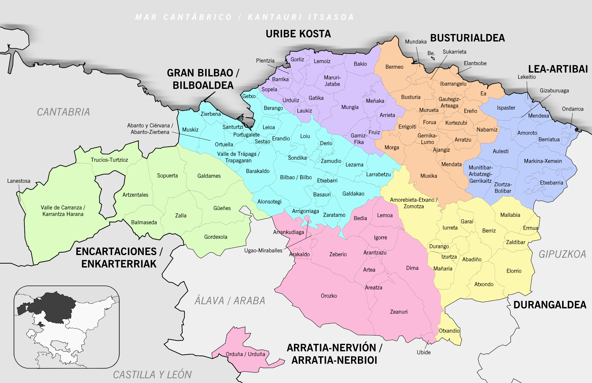 Municipios y comarcas de Bizkaia, actualizado a 2017 / Bizkaiko udalerri eta eskualdeak, 2017 urtean eguneratua